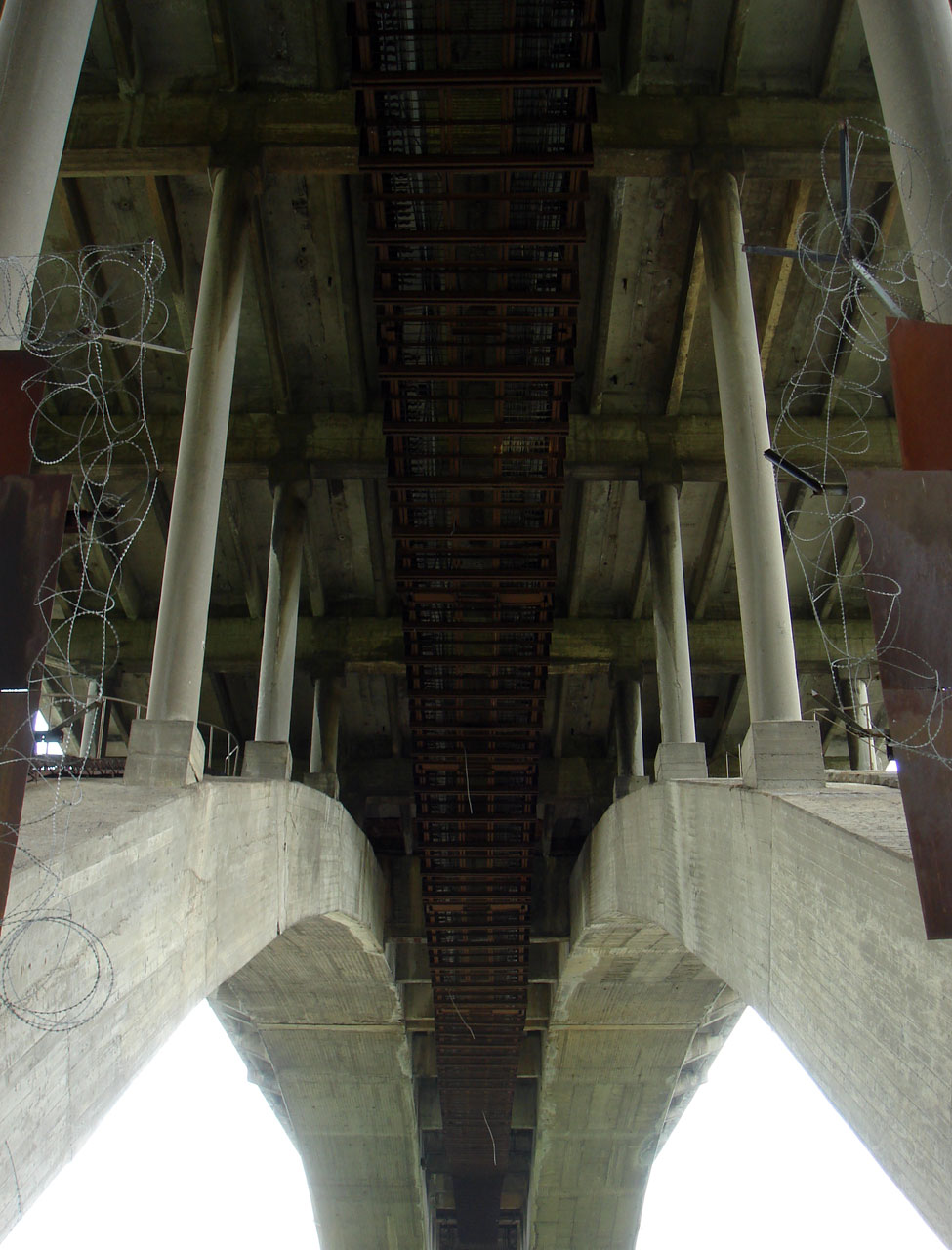 Молитовский мост в Нижнем Новгороде (вид снизу).